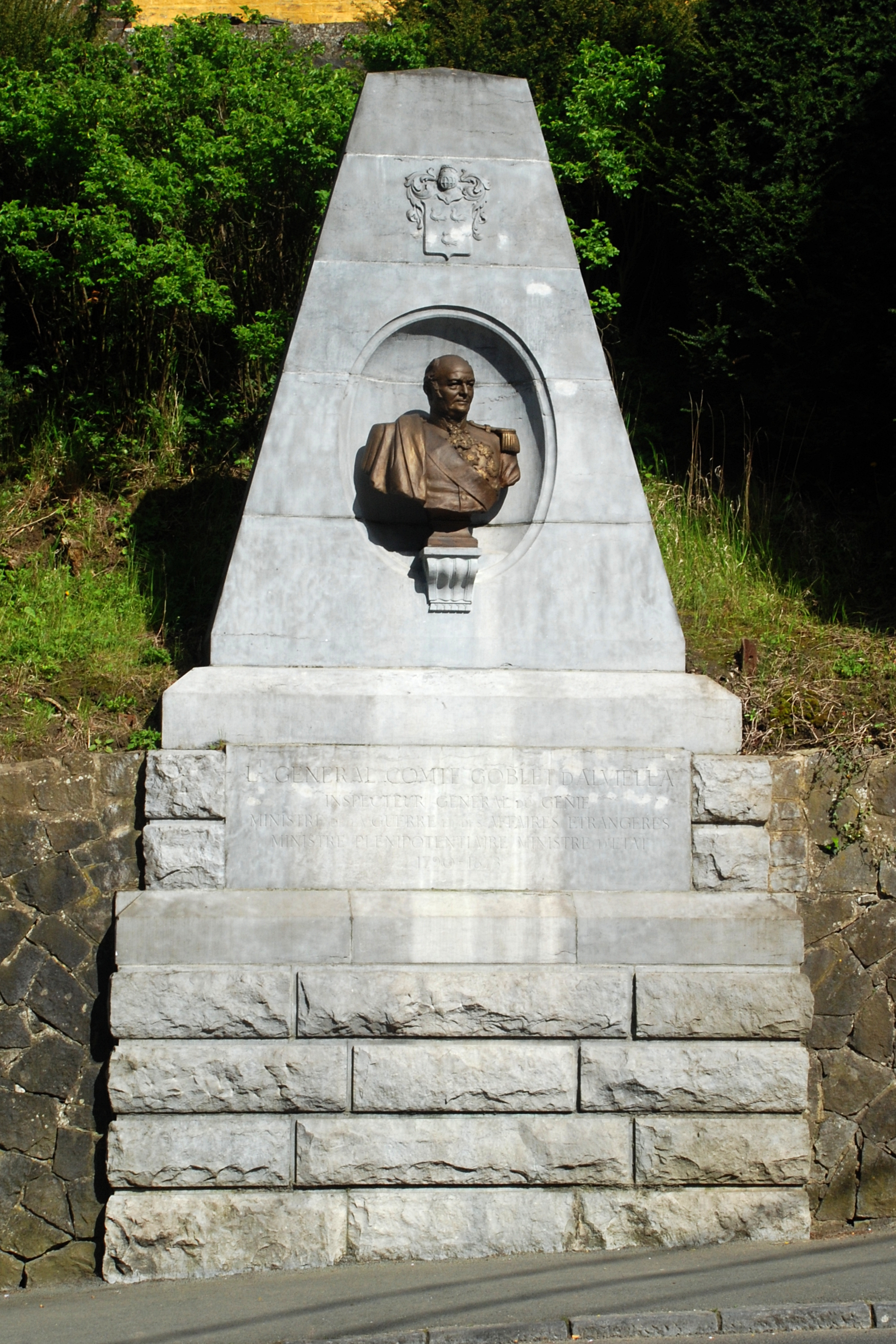 Belgique - Brabant wallon - Court-Saint-Etienne - Monument au comte Goblet d'Alviella